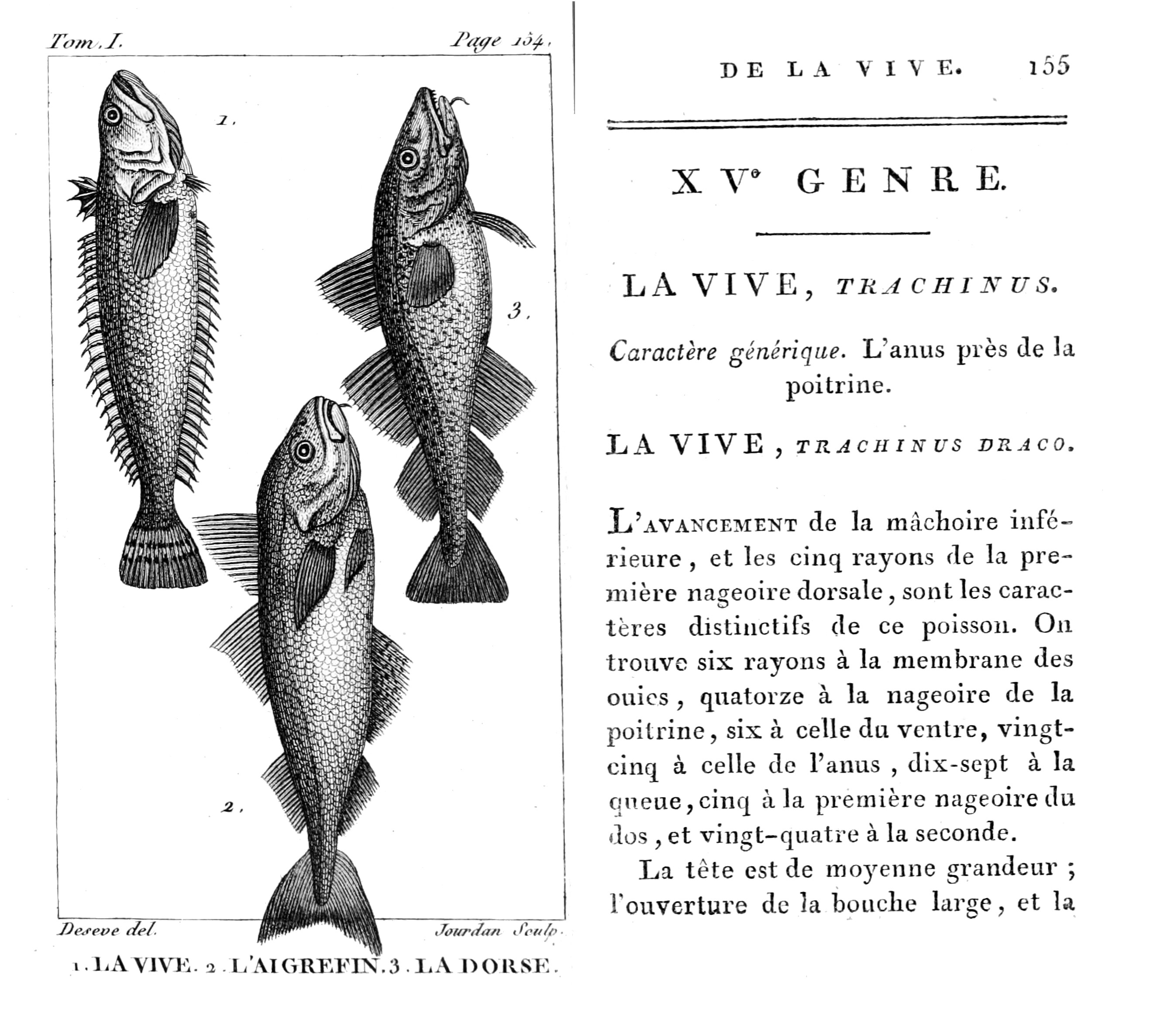 La vive (Trachinus draco), l'aigrefin (Melanogrammus aeglefinus, =Gadus aeglefinus), le dorse (Gadus morhua, =Gadus callarias).